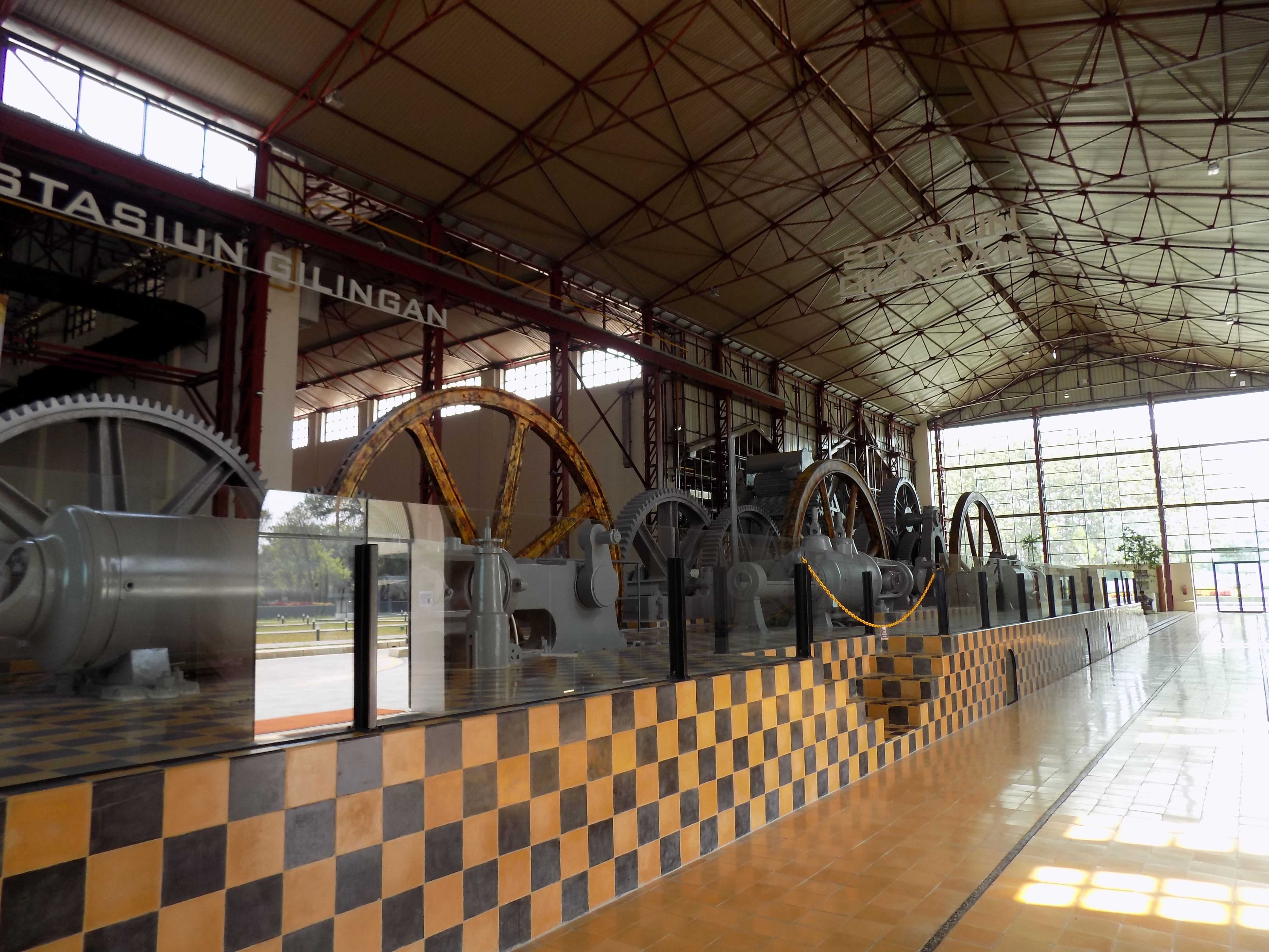 Pabrik Gula Colomadu